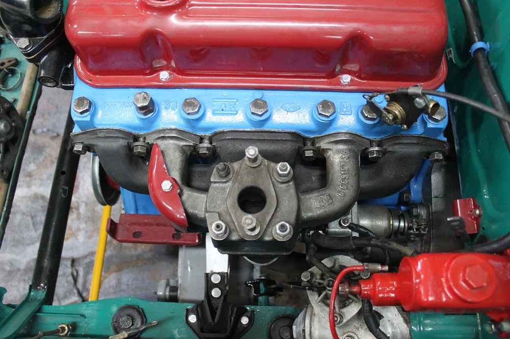 Ansaugstutzen an einer 1500 ccm Opel Maschine von 1958er Rekord Olpmpia P1. Darunter der Abgaskrümmer